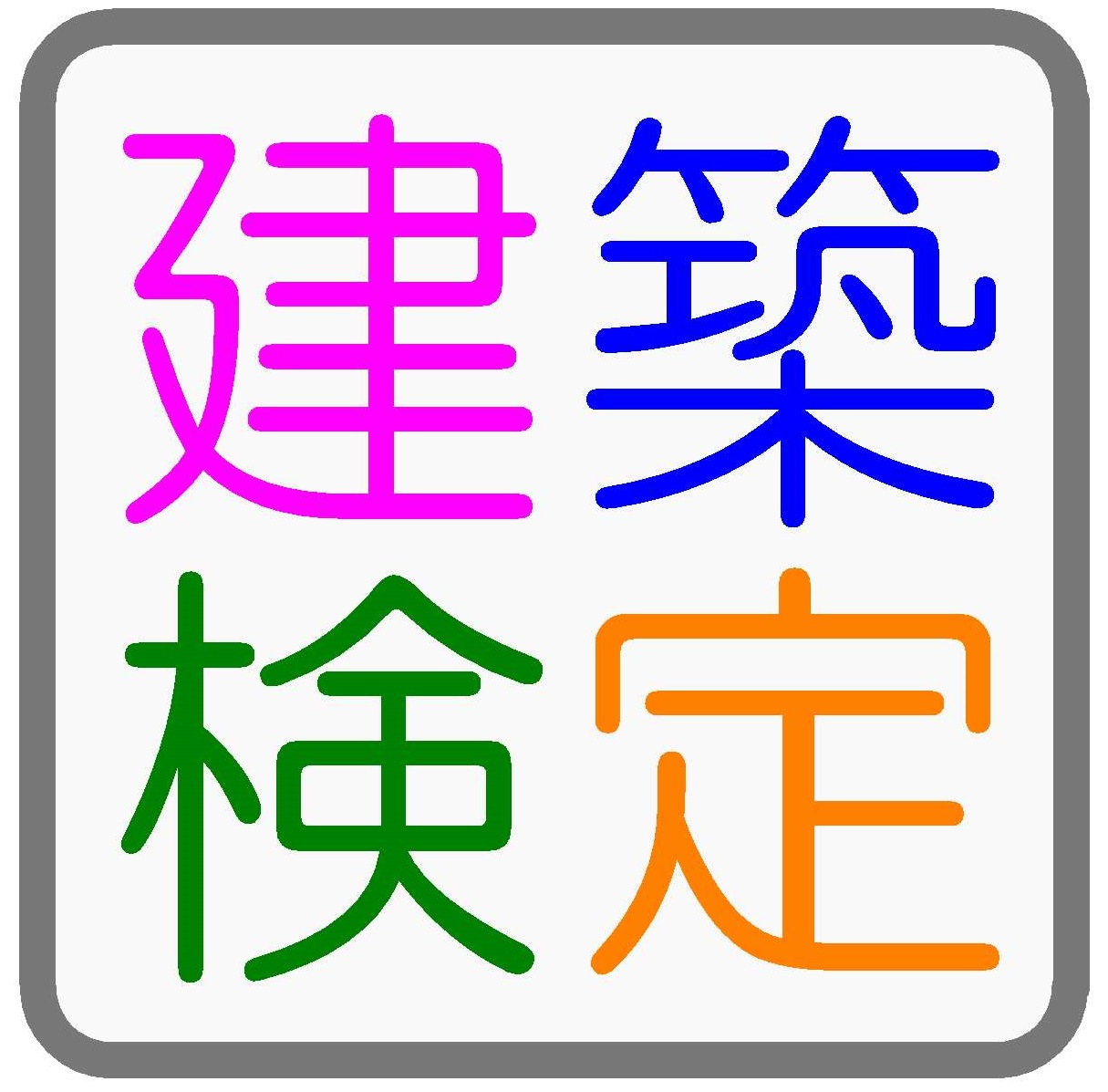 東京構造設計事務所協会が主催する建築検定のロゴ